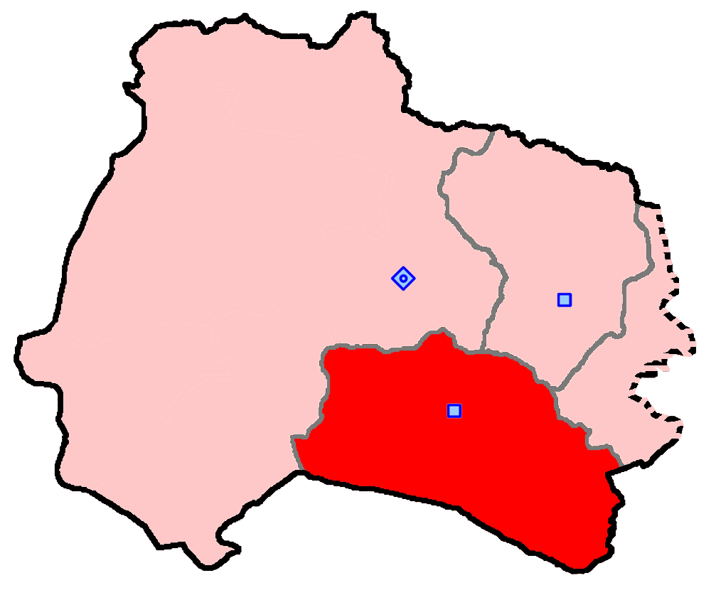 حوزهٔ انتخاباتی اسفراین برای انتخابات مجلس شورای اسلامی